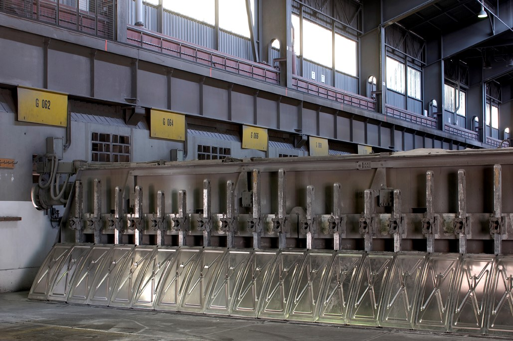 Détail du capotage des cuves d'électrolyse qui supprime la pollution atmosphérique. Usine de Saint-Jean-de-Maurienne.